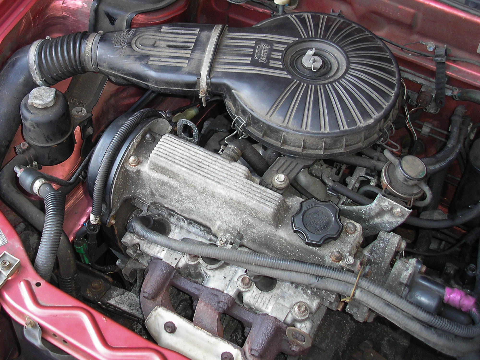 3-Zylinder Ottomotor Suzuki G10A in einem Suzuki Swift SF310.